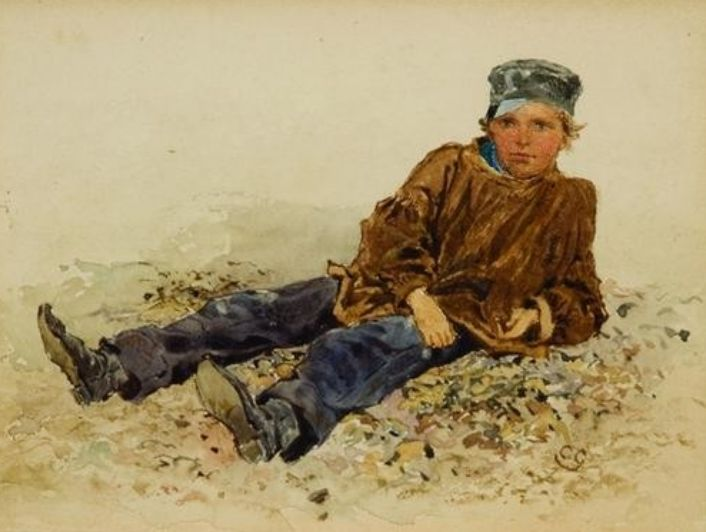 Breaker boy